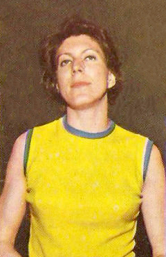 CAMPIONI DELLO SPORT PANINI 1970 1971 MAGALY VETTORAZZO ATLETICA LEGGERA